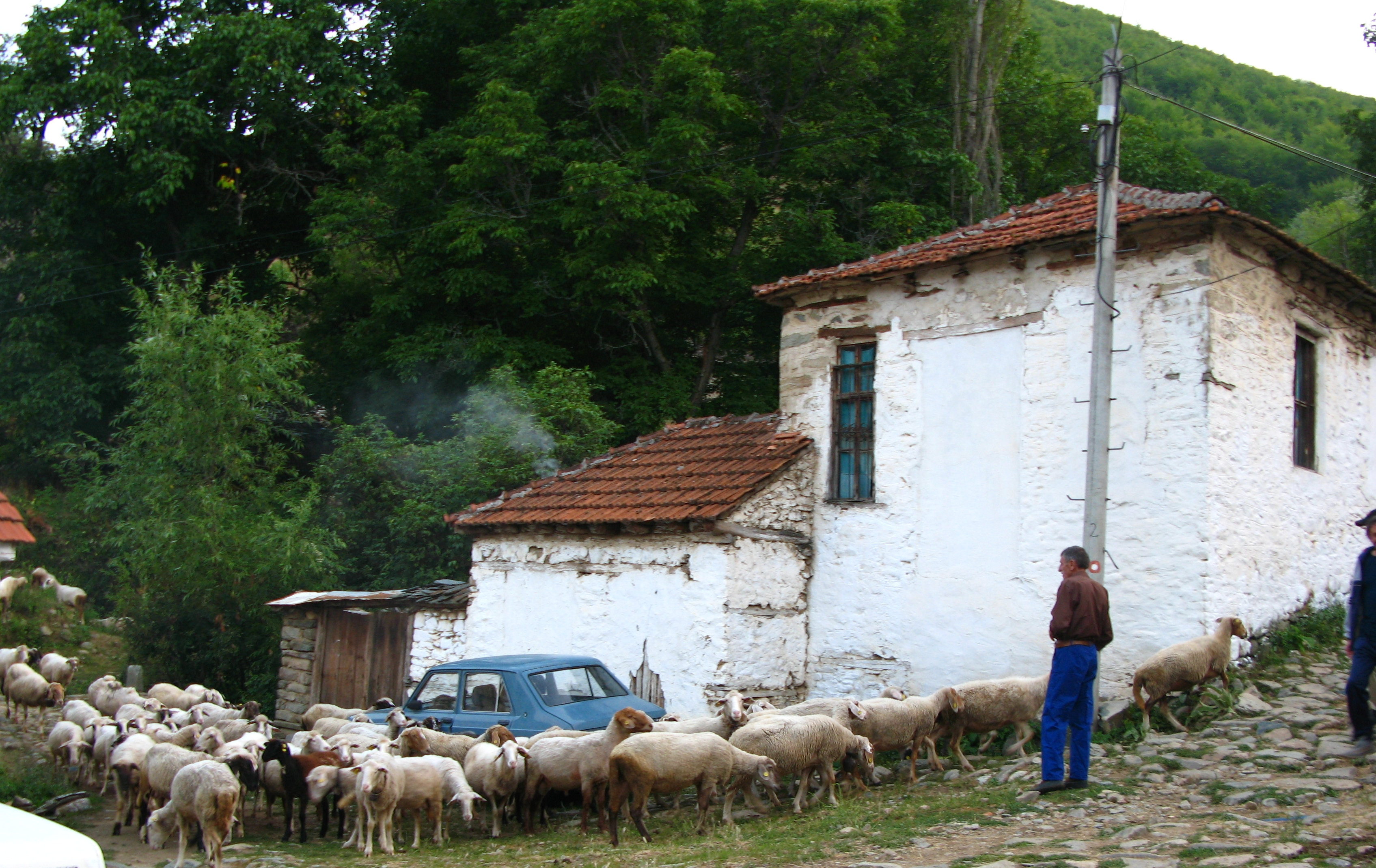 Овчереја у селу Маловиште, општина Ресен, Македонија.